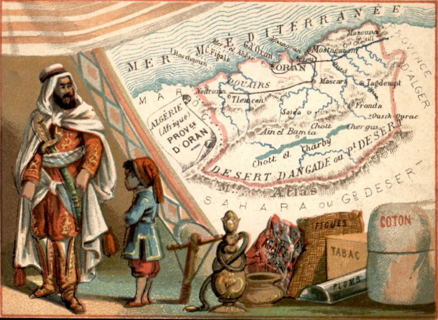 Province d'Oran, carte postale ancienne, avant 1914.